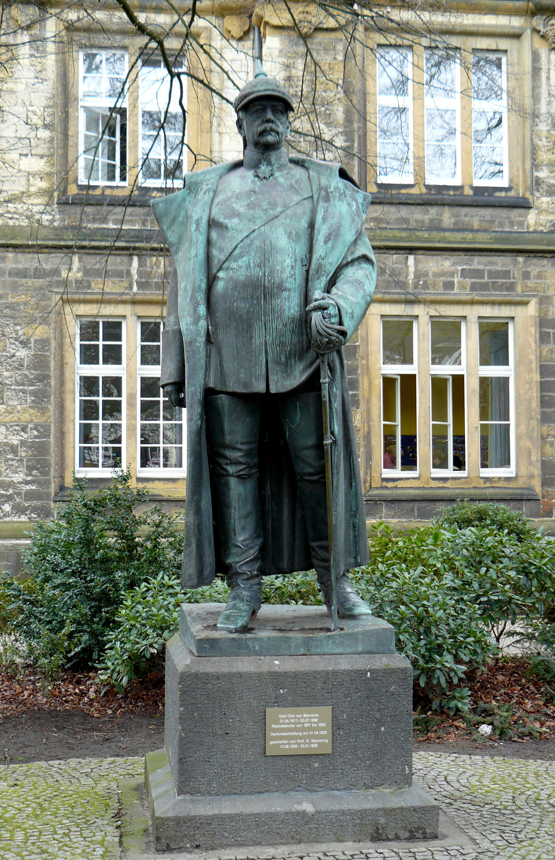 Otto von Bismarck Denkmal von Rudolf Siemering in Bielefeld